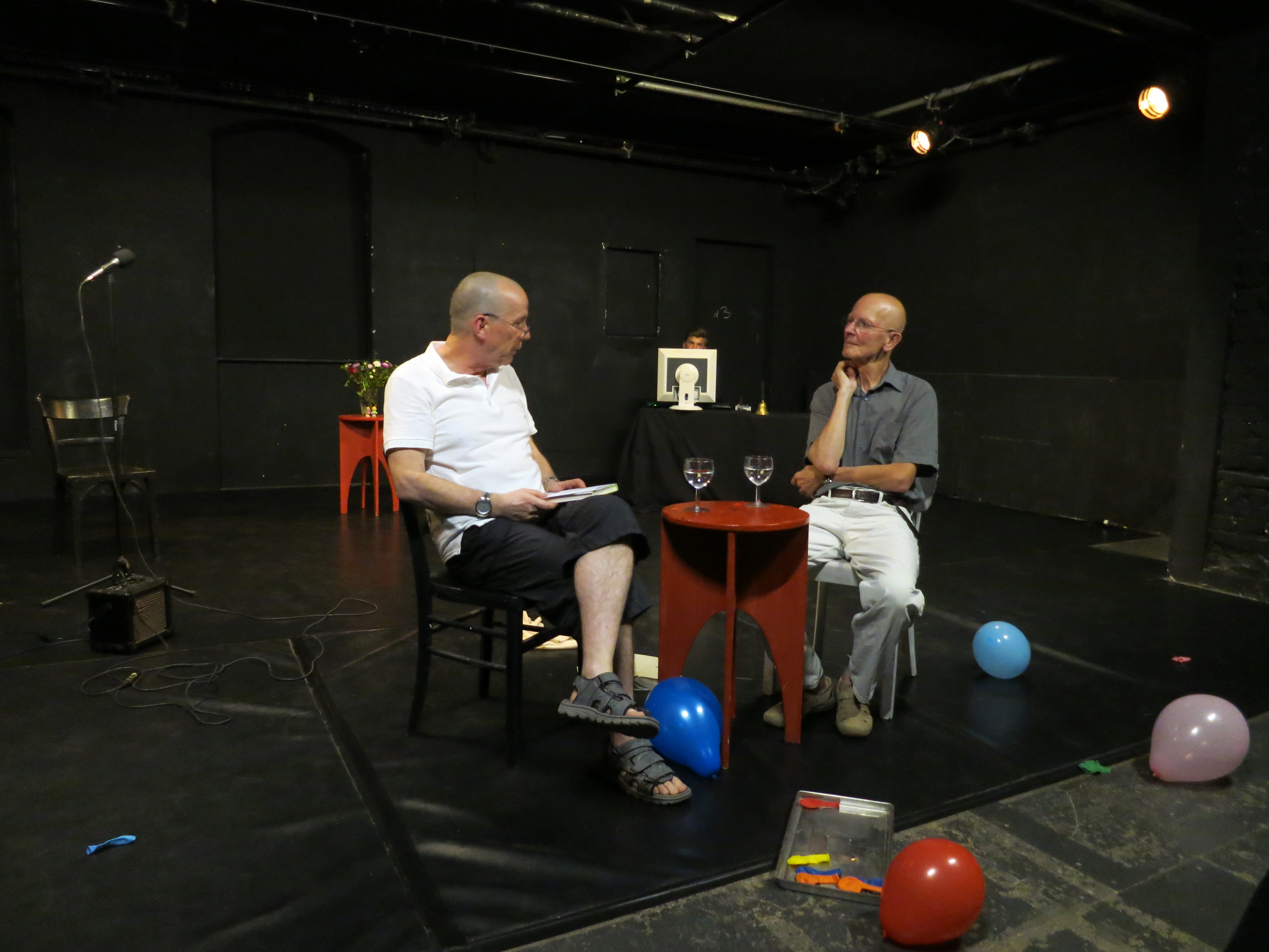 Im ACUD-Theater Berlin, "Jäger Gejagte - 5 Gedichte von Uwe Hübner" am 27.8.2016